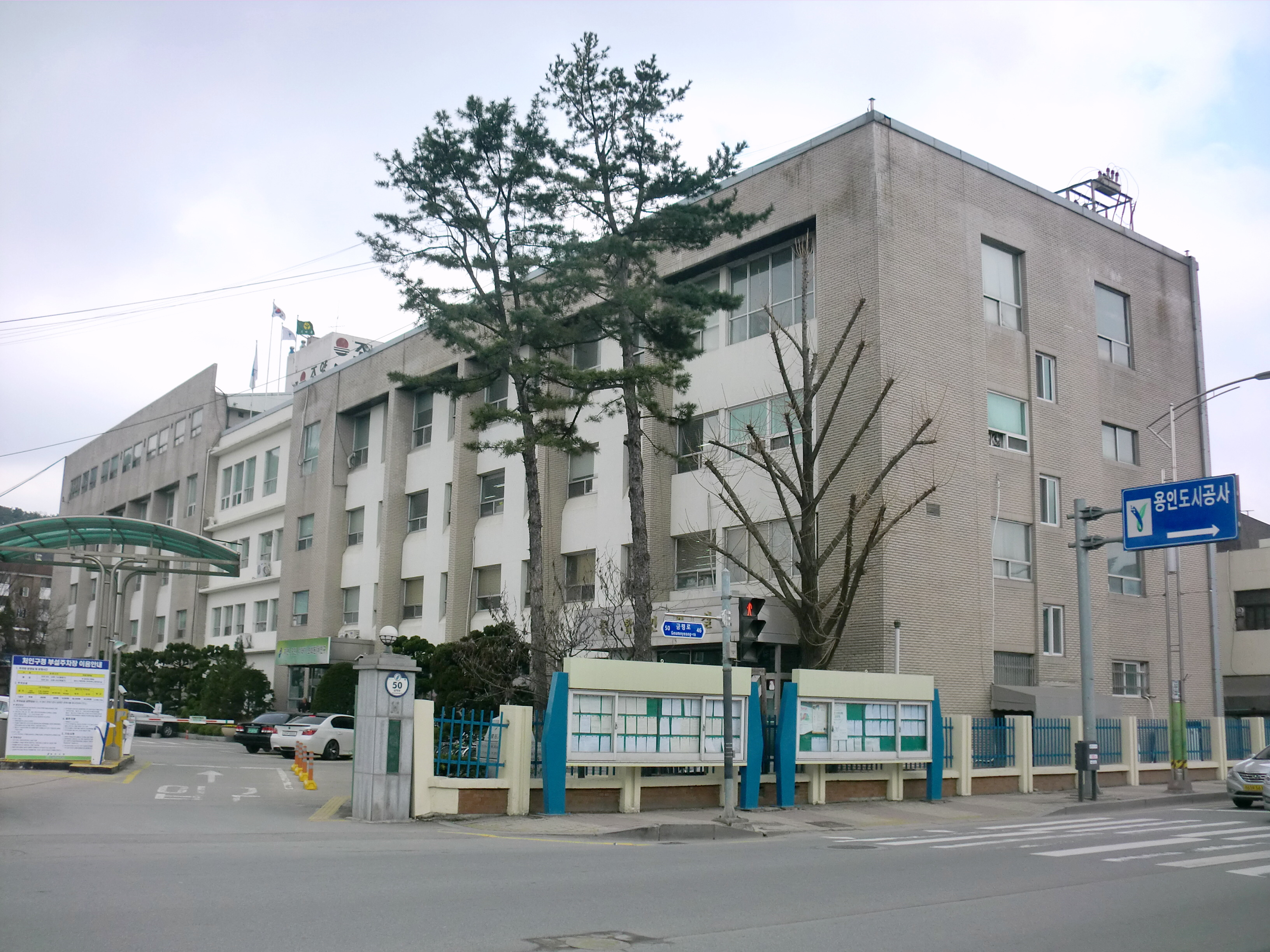 경기도 용인시에 있는 처인구청(구 용인시청)